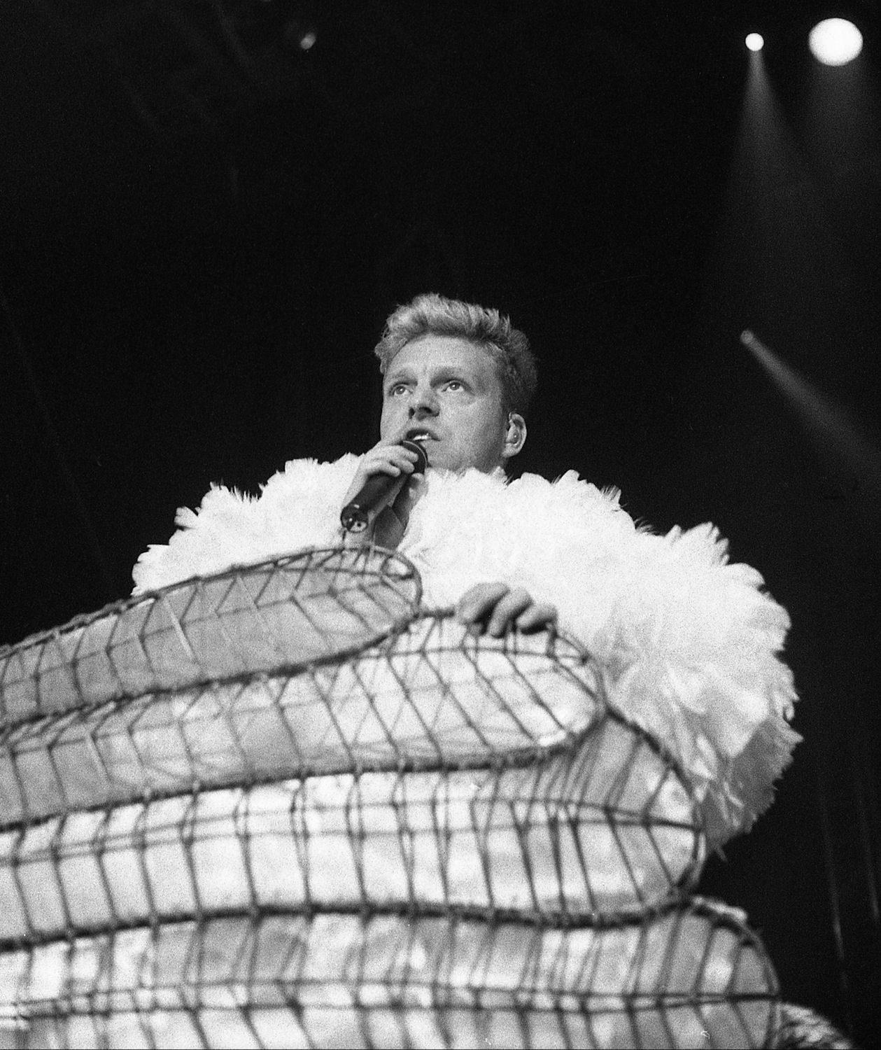 Erasue (Andy Bell) bei einem Konzert in Magdeburg am 08.09.1992